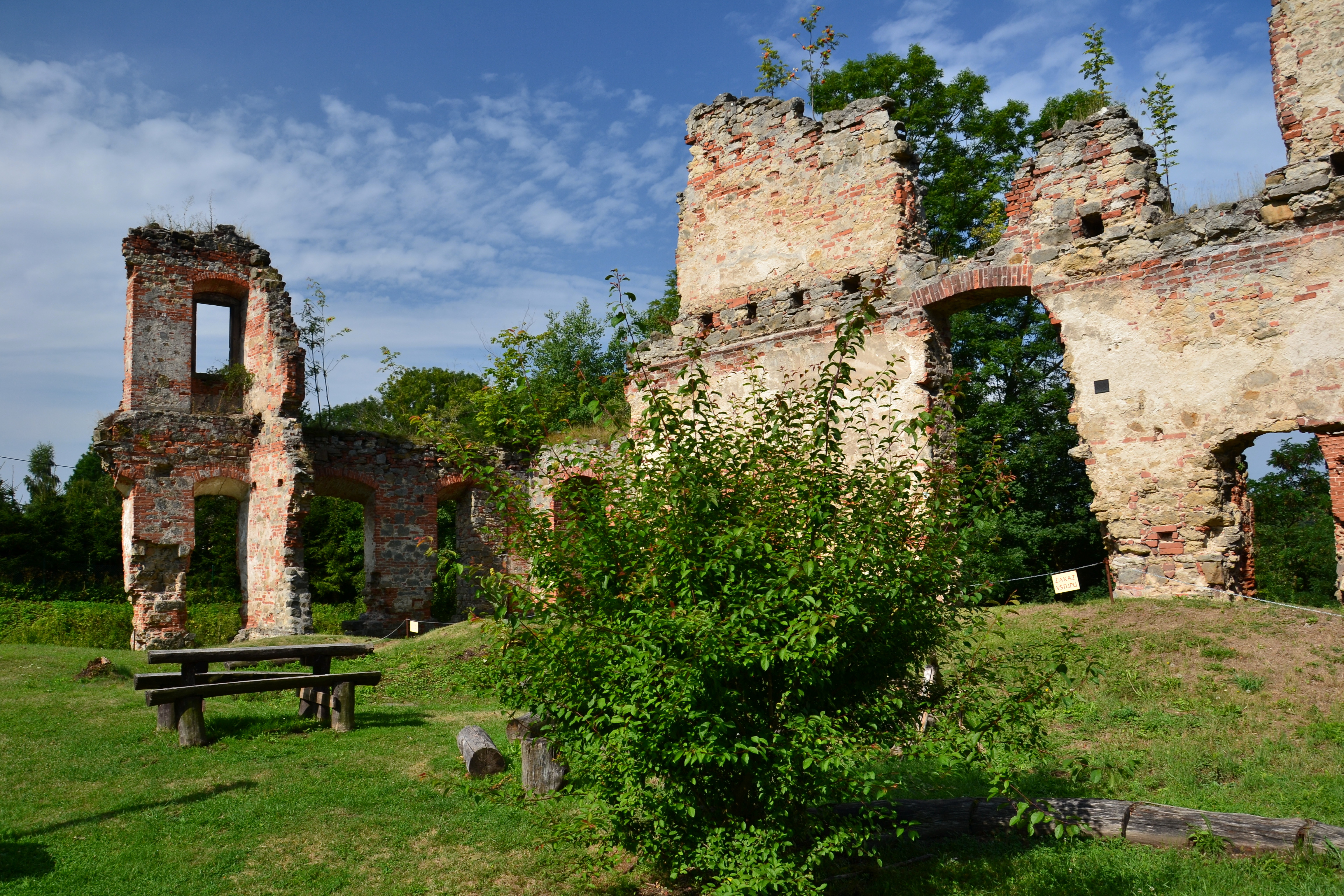 Západní nároží nádvoří, zámek Zásadka, severozápadní okraj vsi, Sychrov (Mnichovo Hradiště).